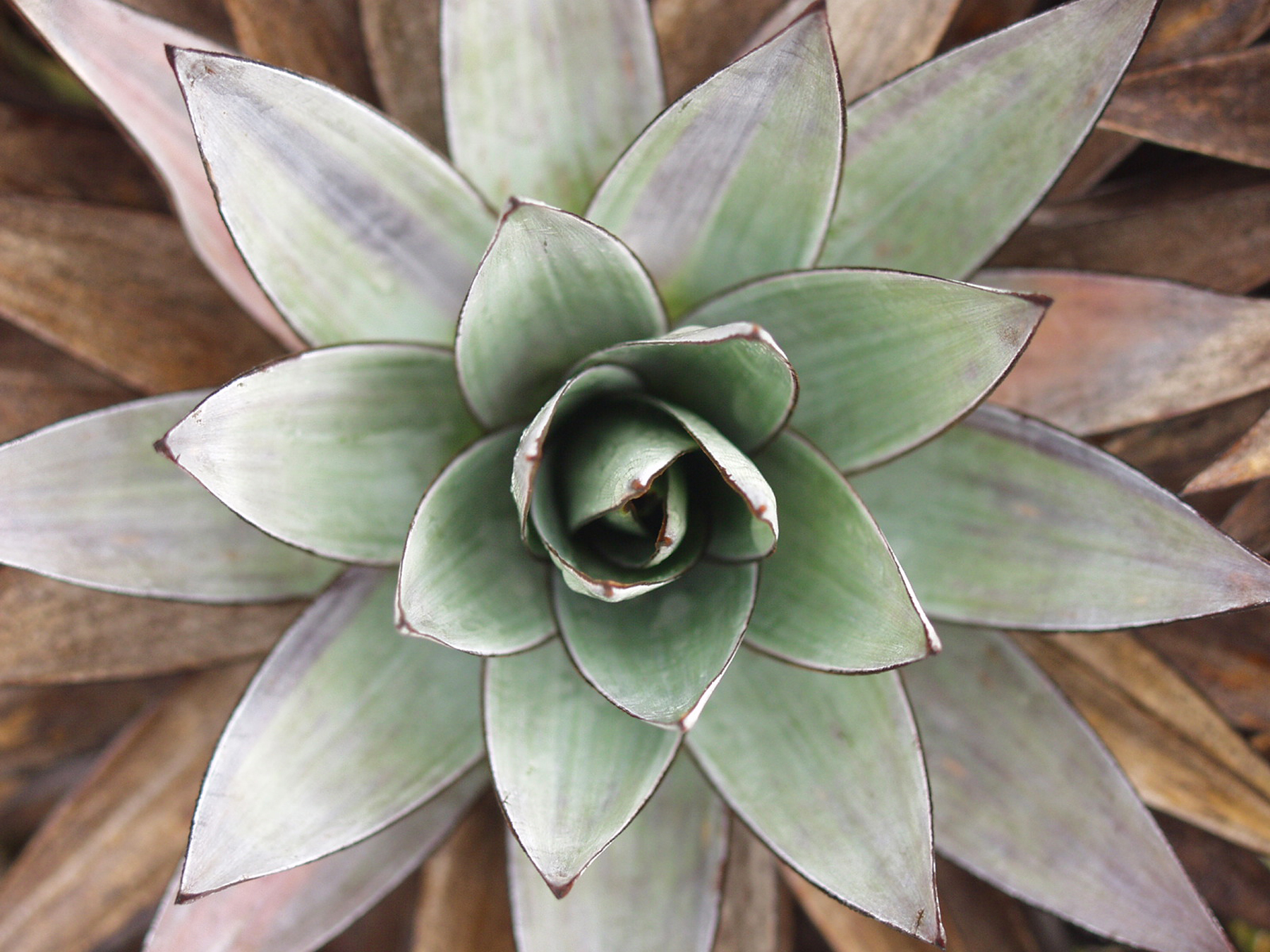 Bromeliad on Mount Roraima, Venezuela